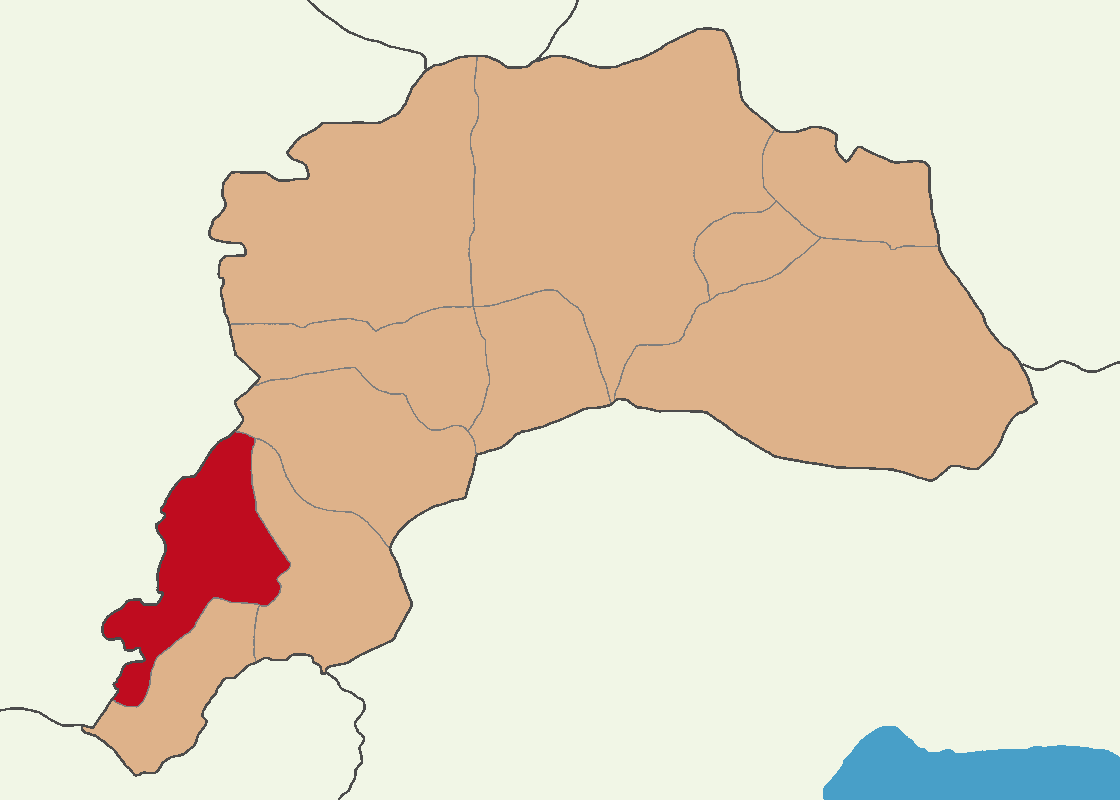 Gölhisar ilçesinin konumu